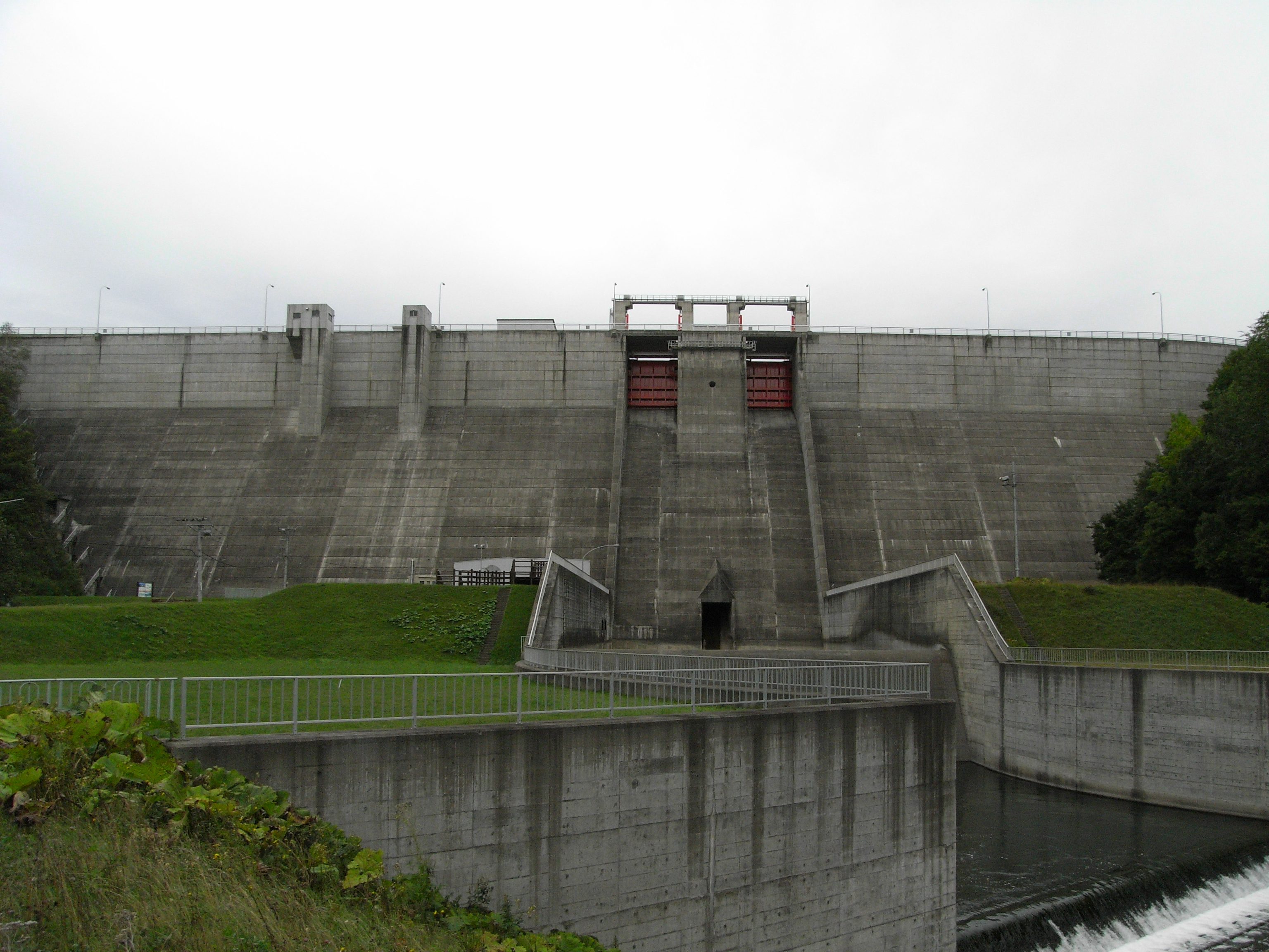 Dam